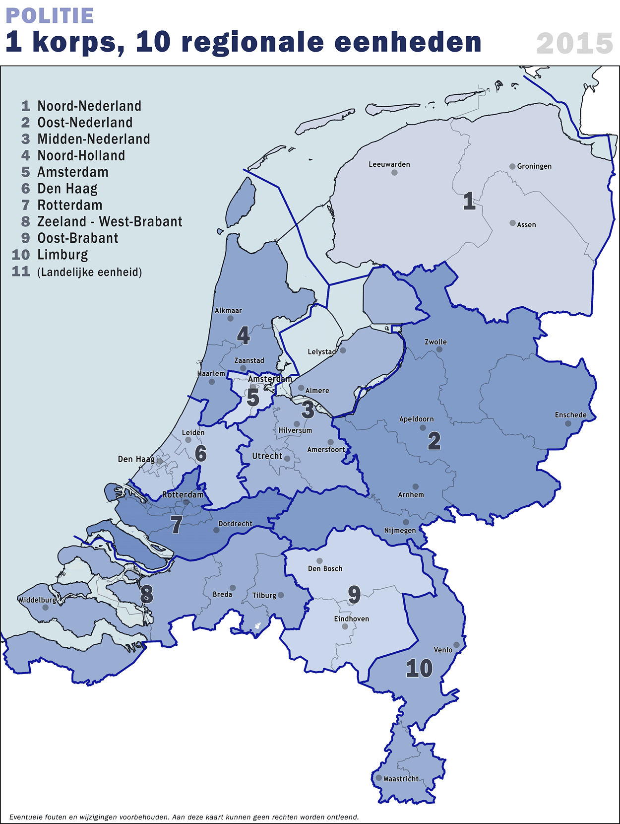 Overzichtskaart van de 10 eenheden van de Nationale Politie, per 2015.